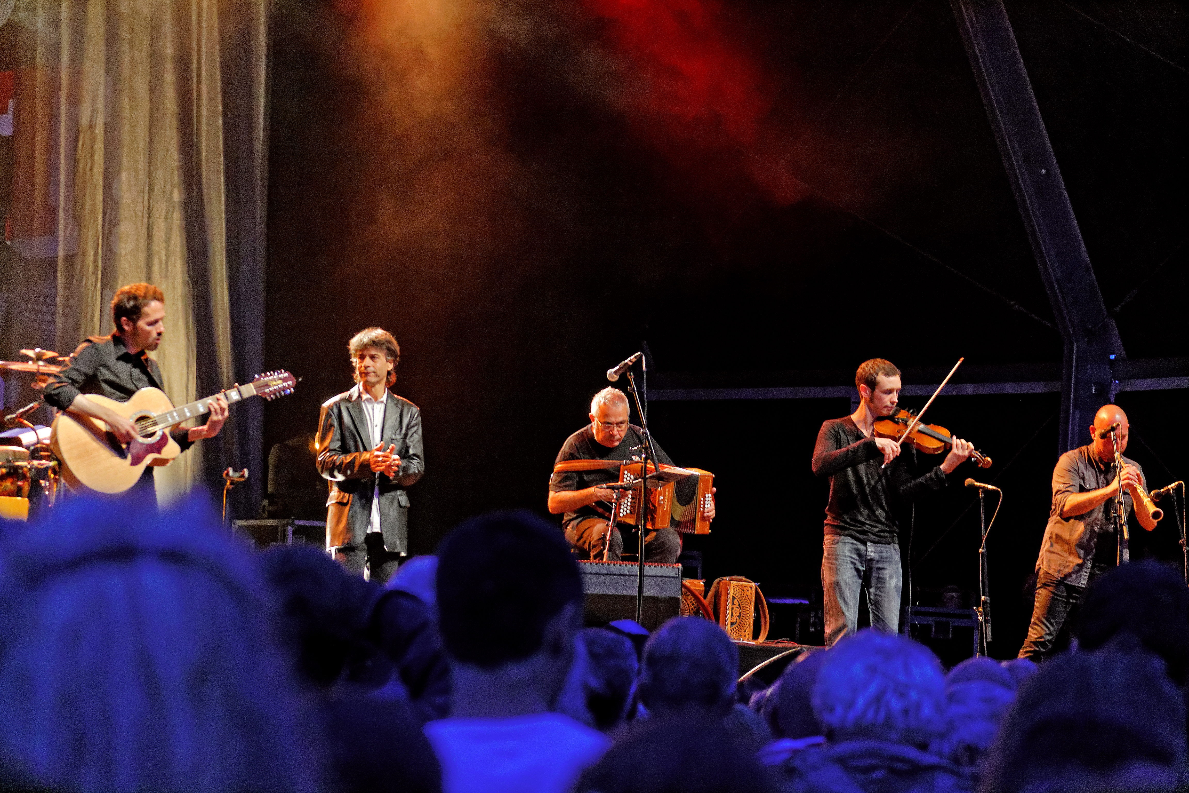 Denez Prigent en concert pour Les Jeudis du port à Brest le 13 août 2015.